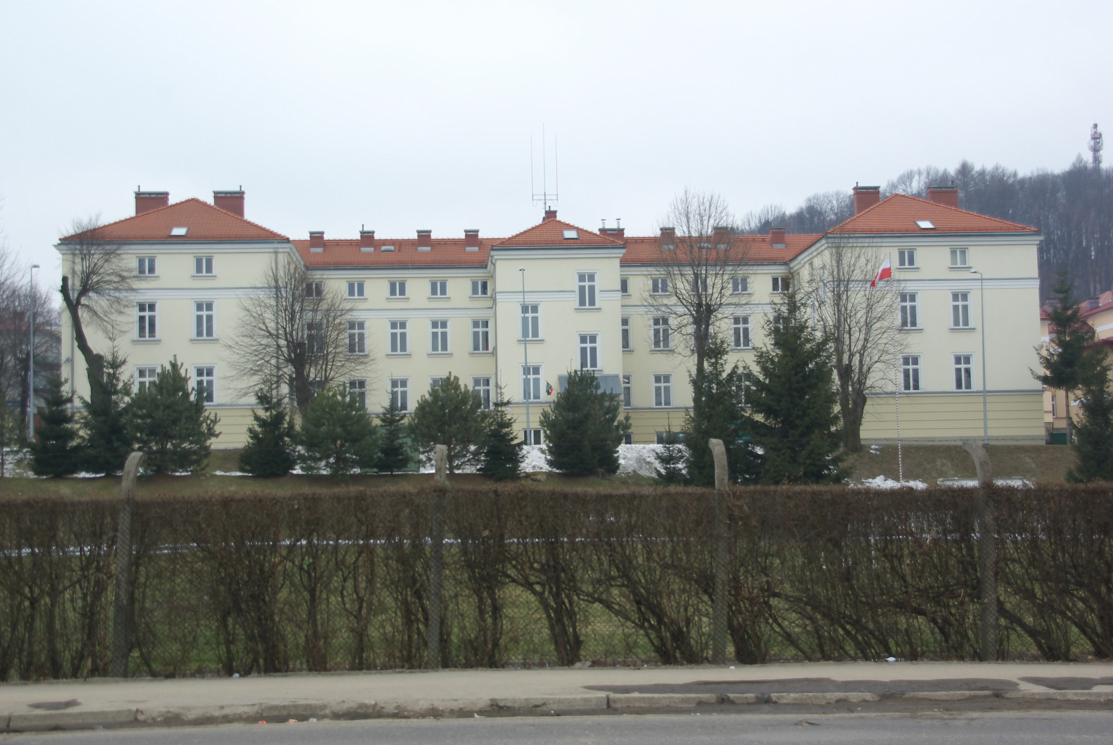 Budynek przy ulicy Mickiewicza 23 w Sanoku, placówka Bieszczadzkiego Oddziału Straży Granicznej